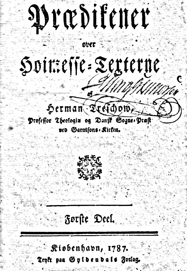 Tittelblad til Treschows prædikener, Første Deel.